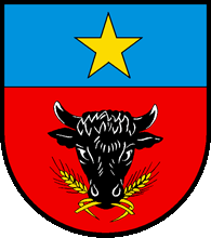 Wappen von Mörel-Filet Kanton Wallis Schweiz